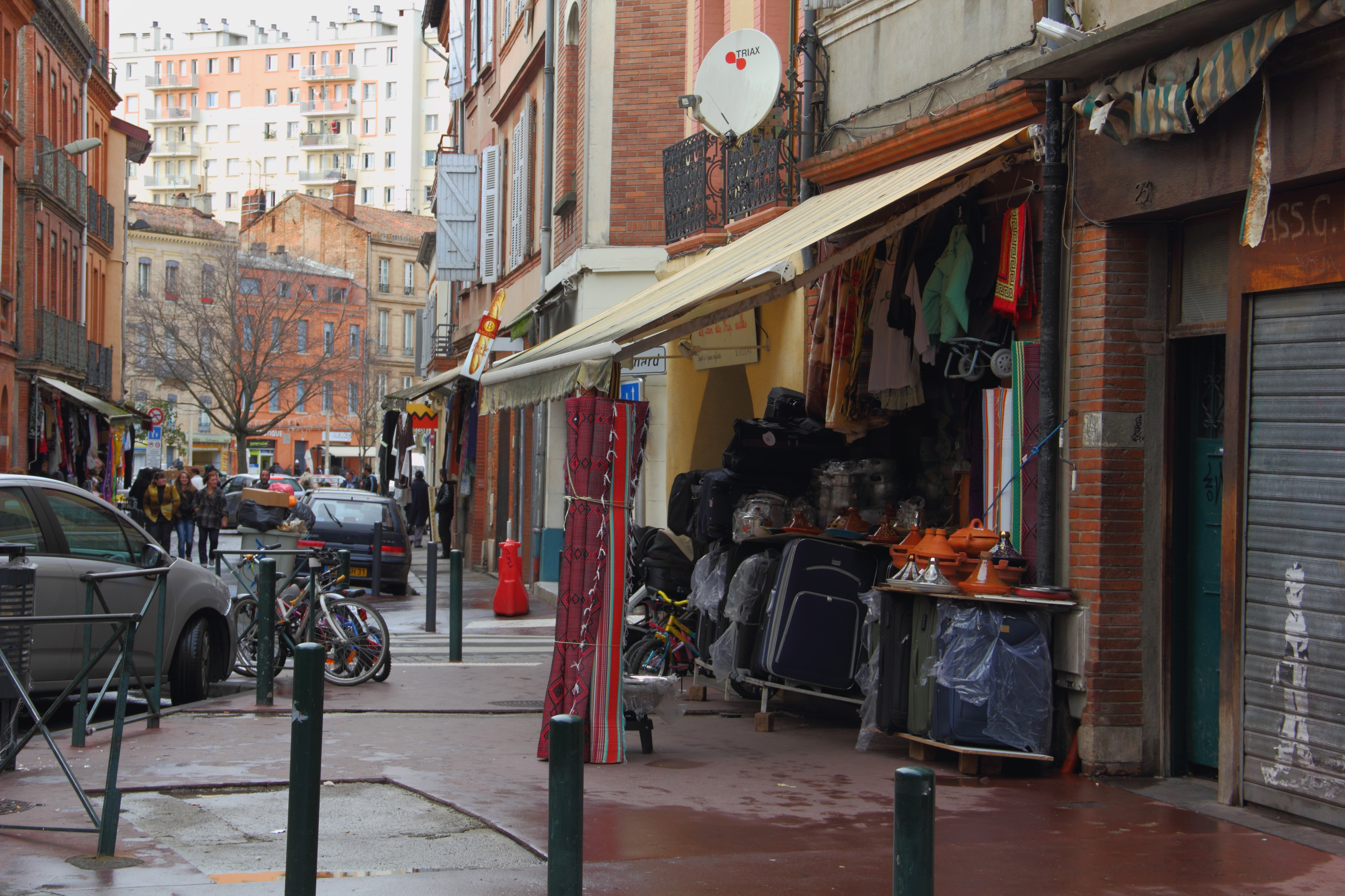 Quartier Arnaud Bernard, Toulouse